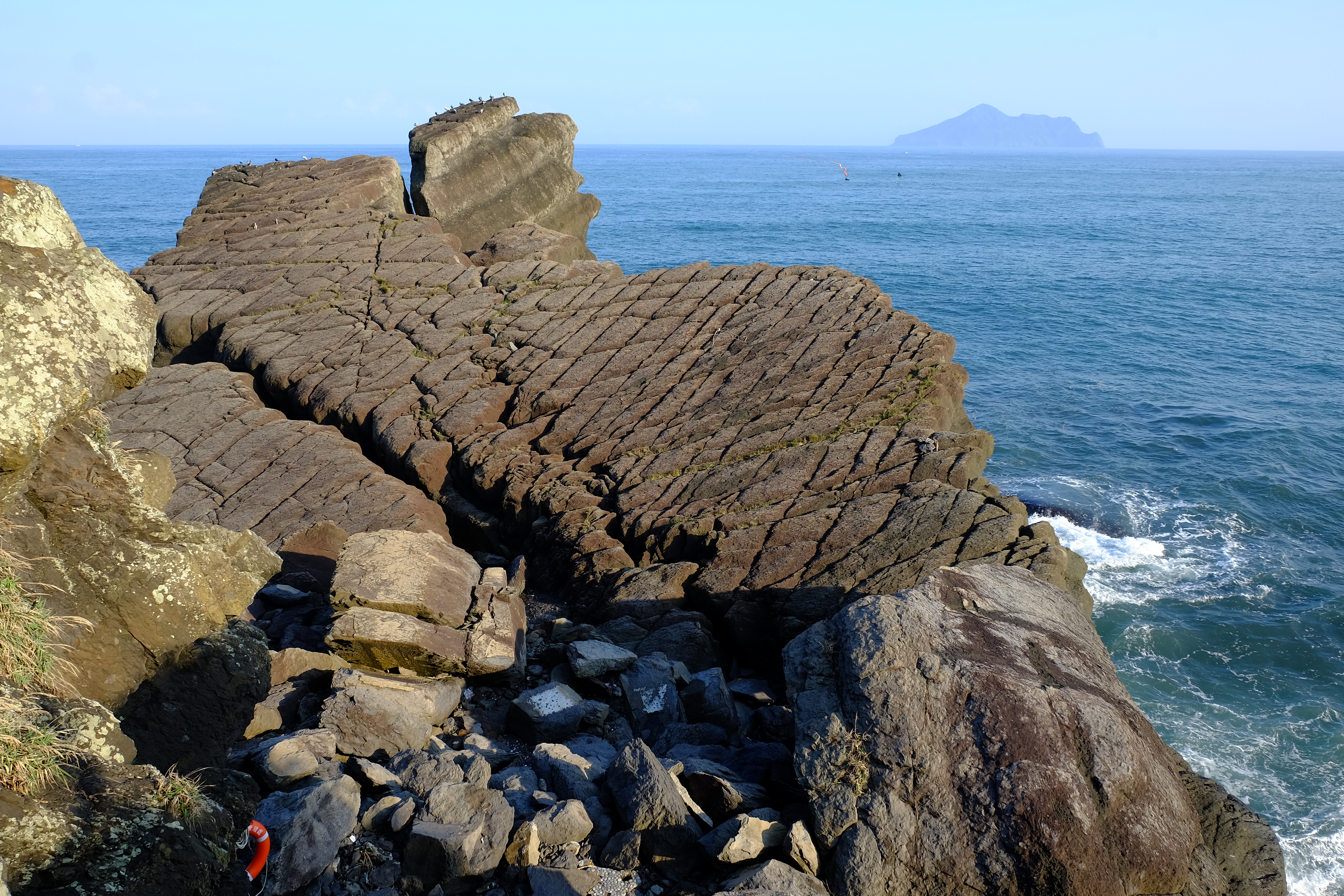 中文（台灣）: Beiguan Tidal Park特殊地質 2016b